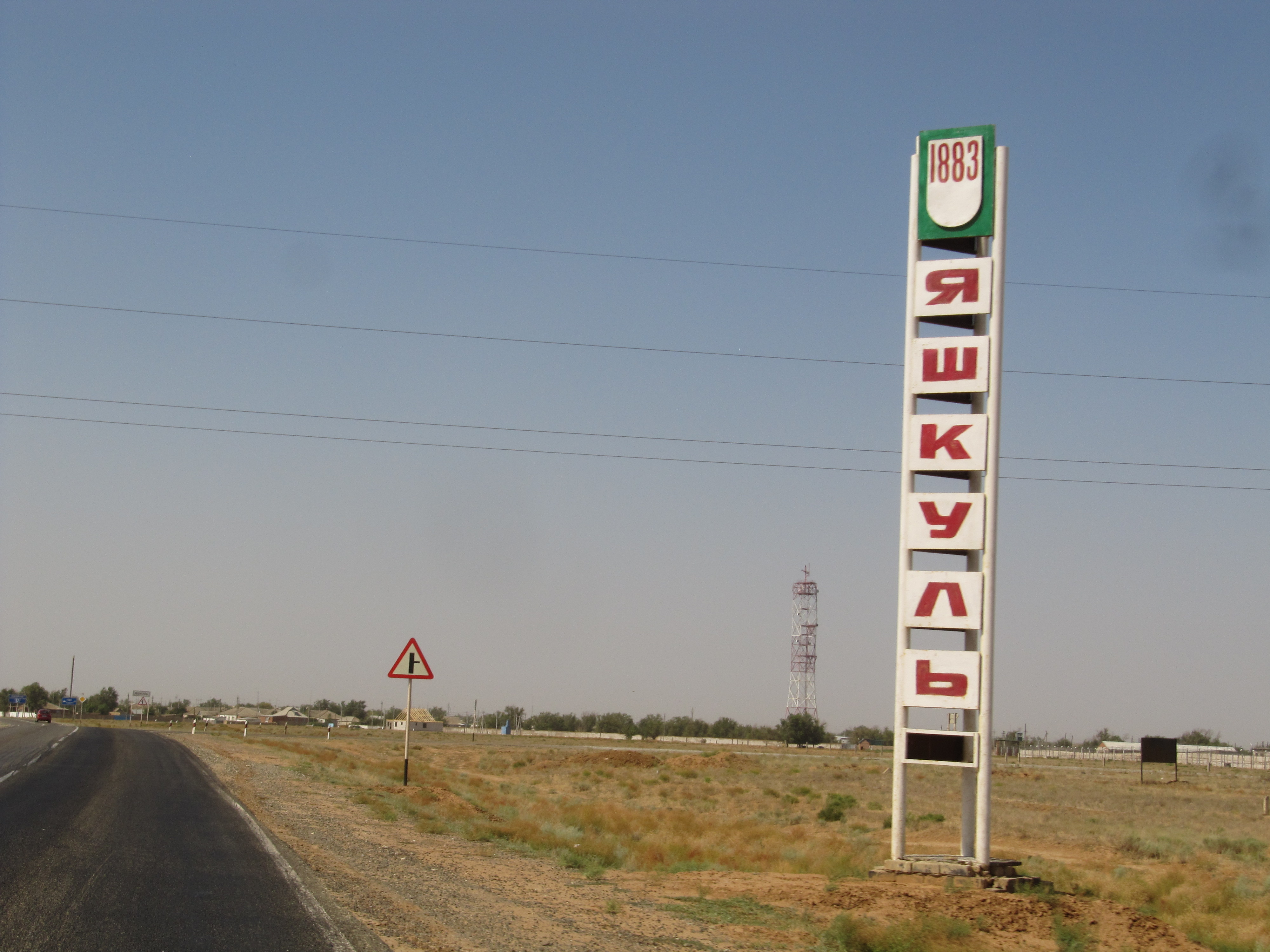 Дорожный знак при въезде в посёлок Яшкуль, Калмыкия